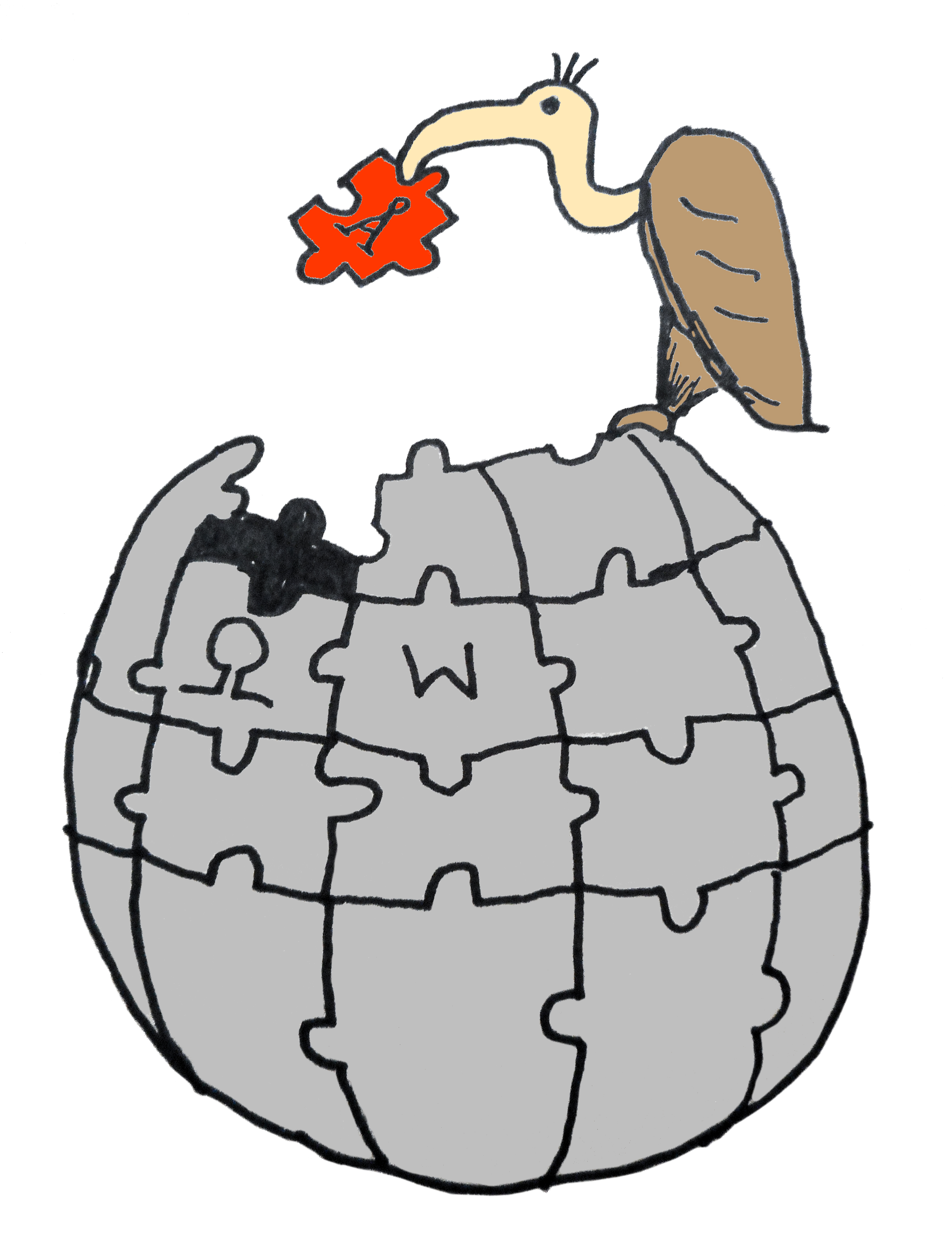 Ein Löschgeier bei seiner Arbeit in der deutschen Wikipedia